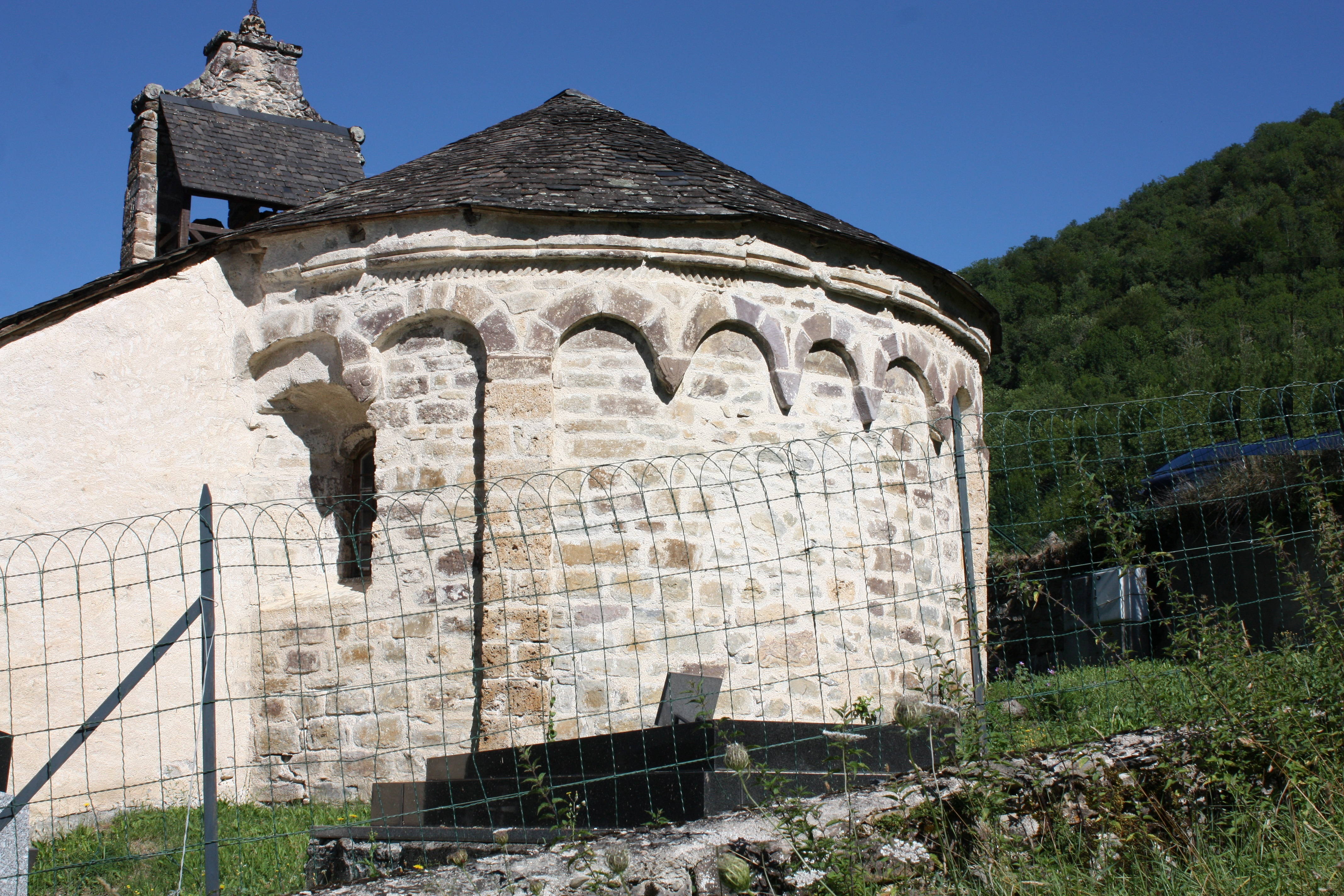 Balacet - Eglise Saint-Lizier